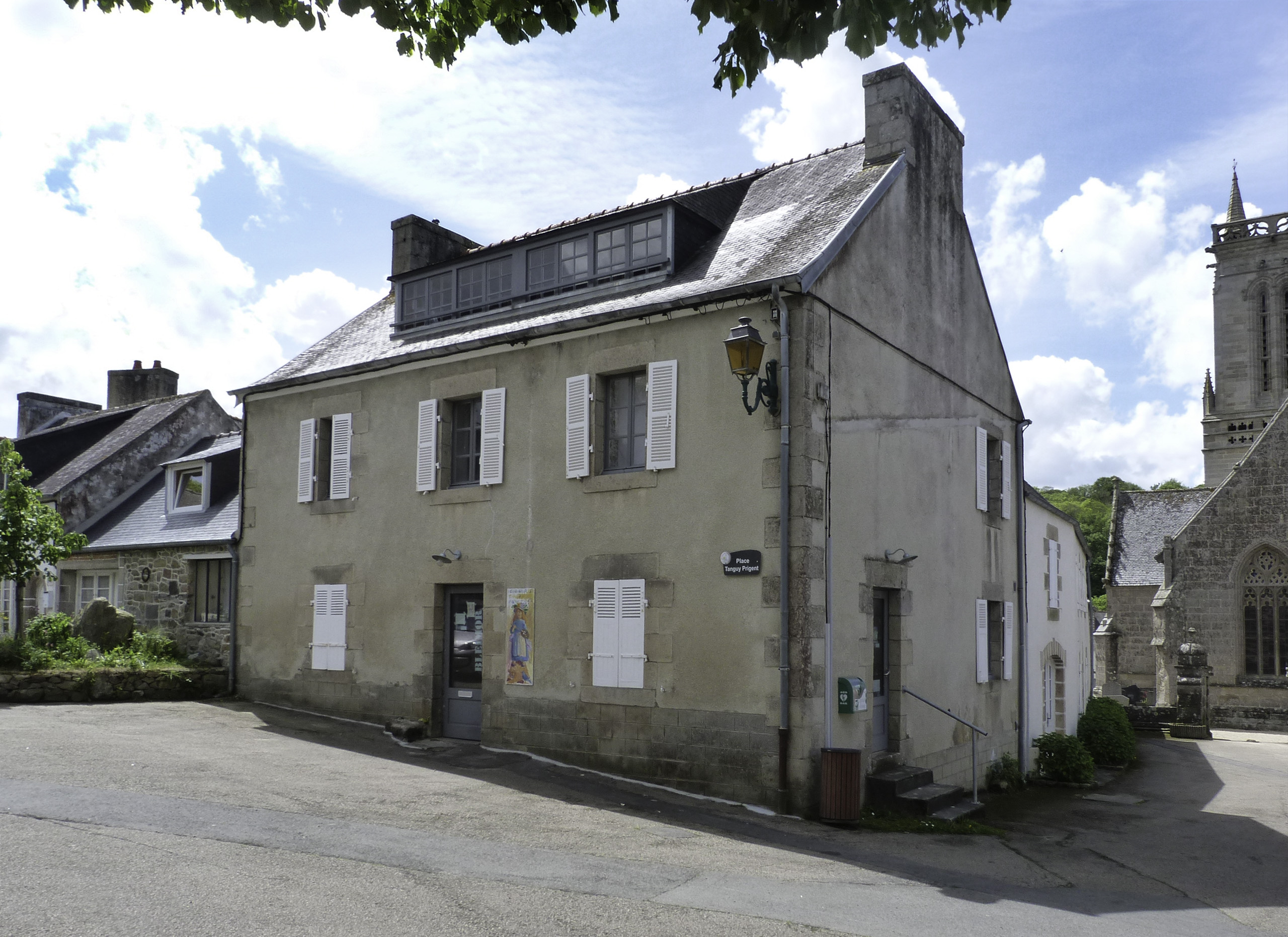 maison de l'artiste